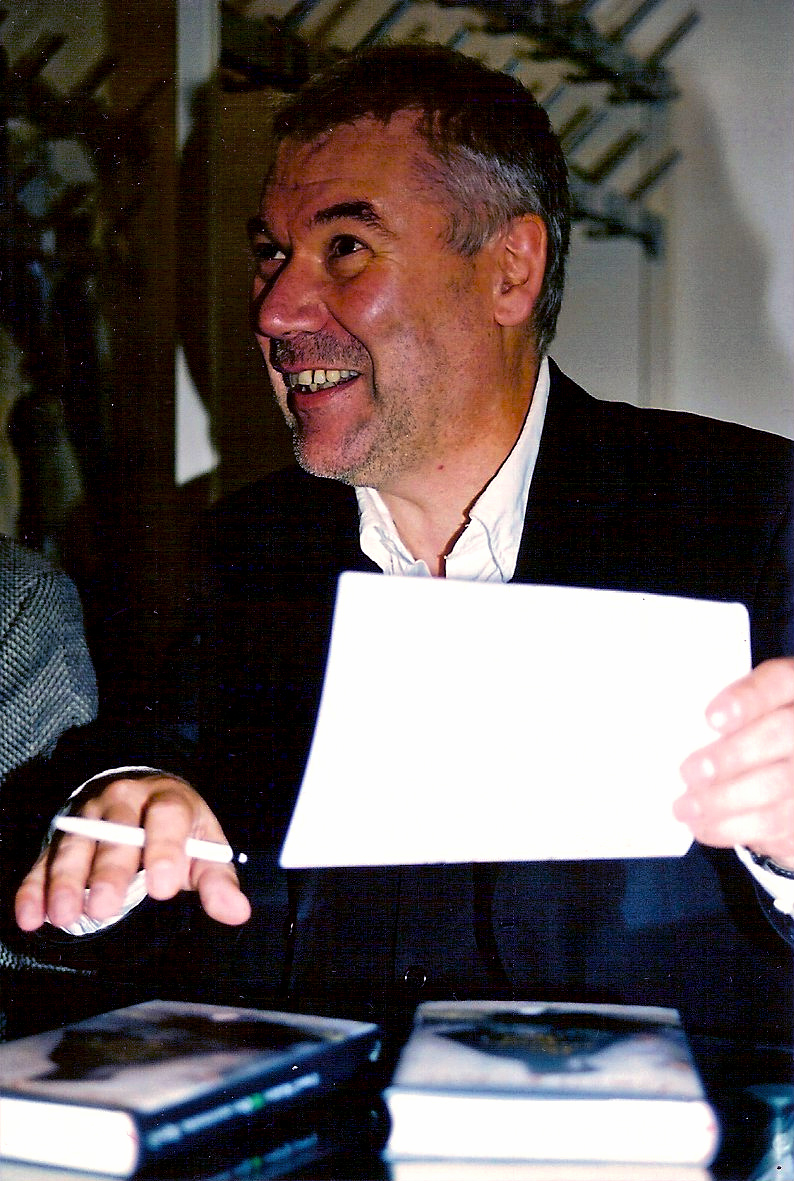 Joachim Röhm bei einer Lesung in Zürich